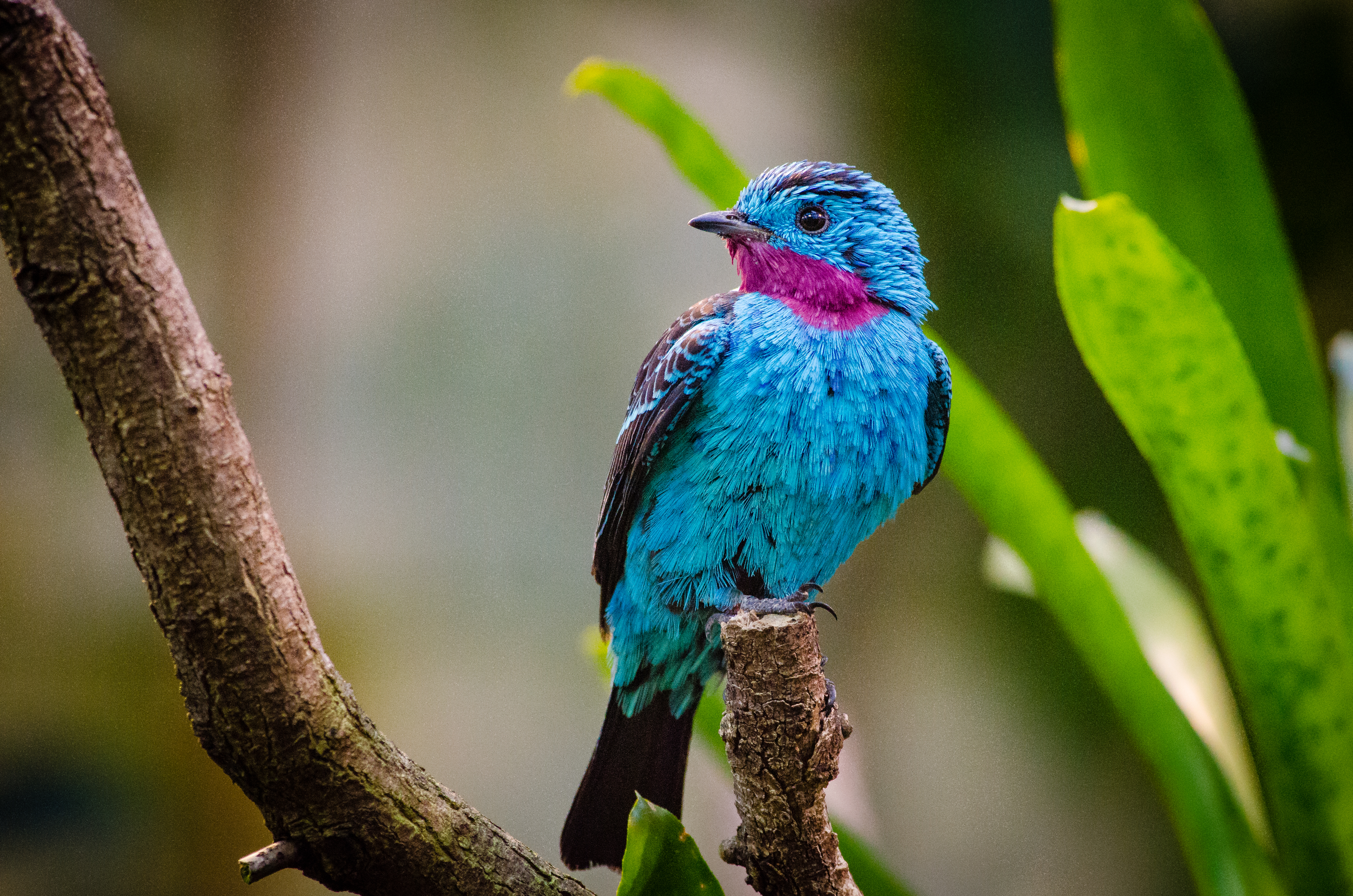 Spangled cotinga (male)